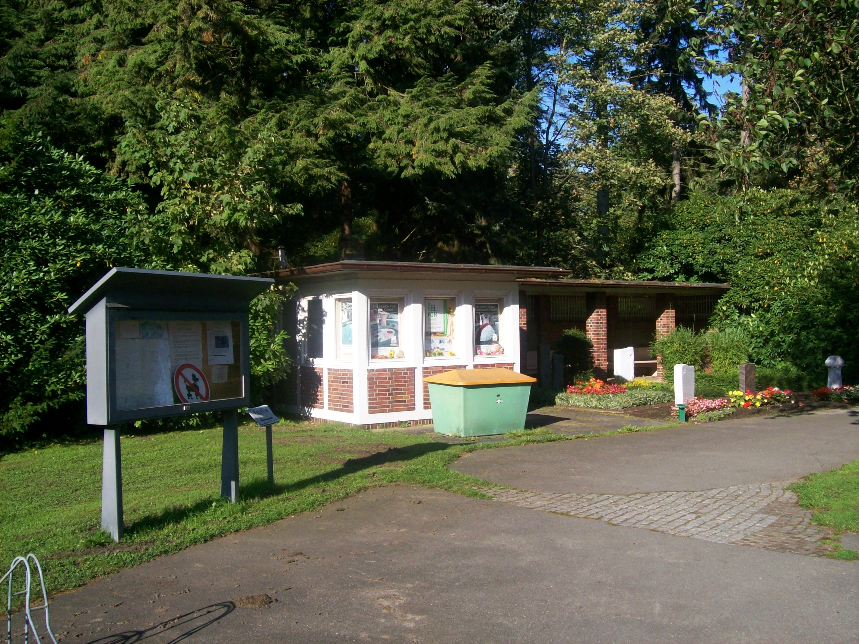 Bahrenfeld, Hamburg, Germany